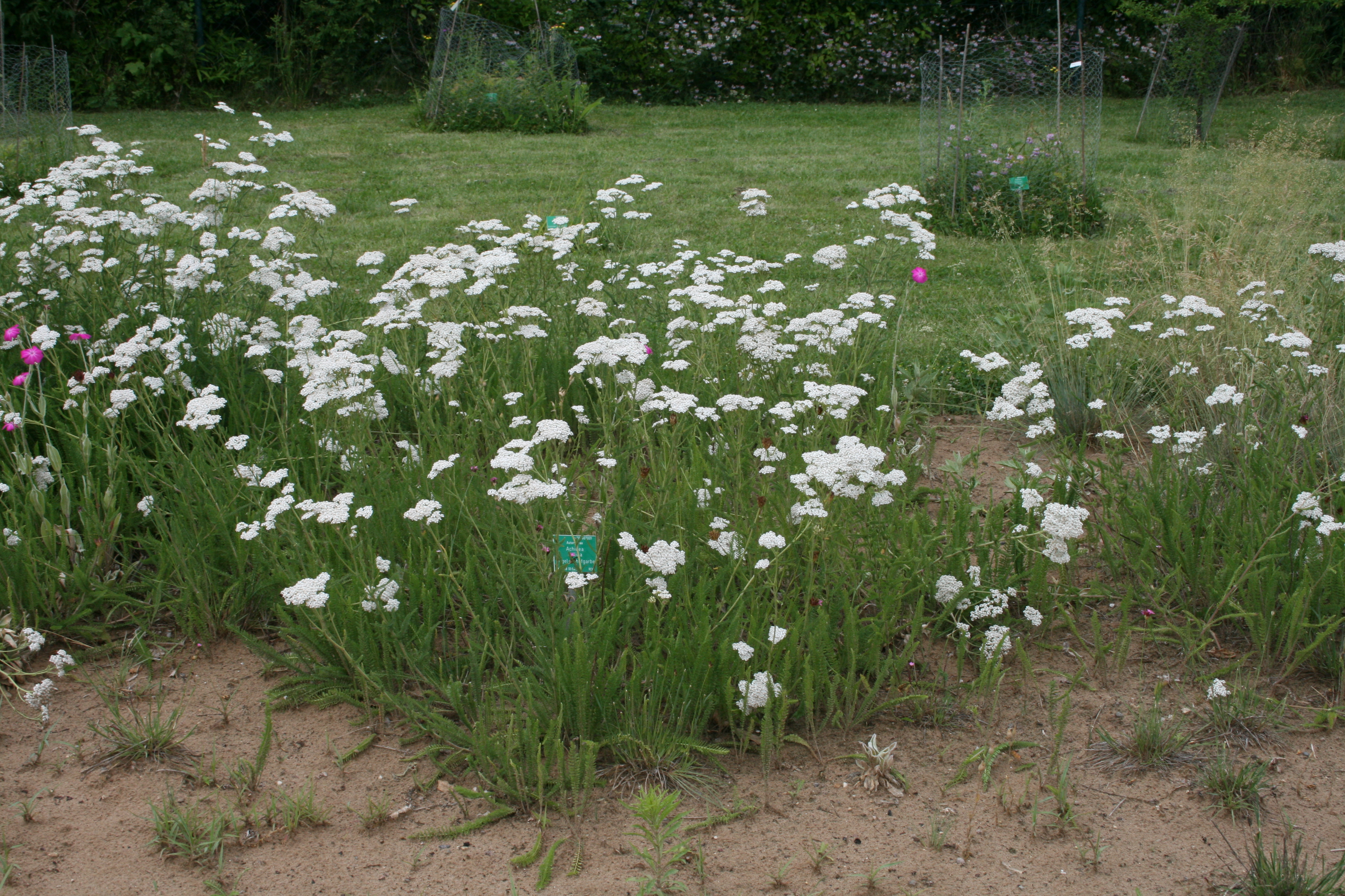 Asteraceae im Ober-Olmer Wald. Natalie Schmalz